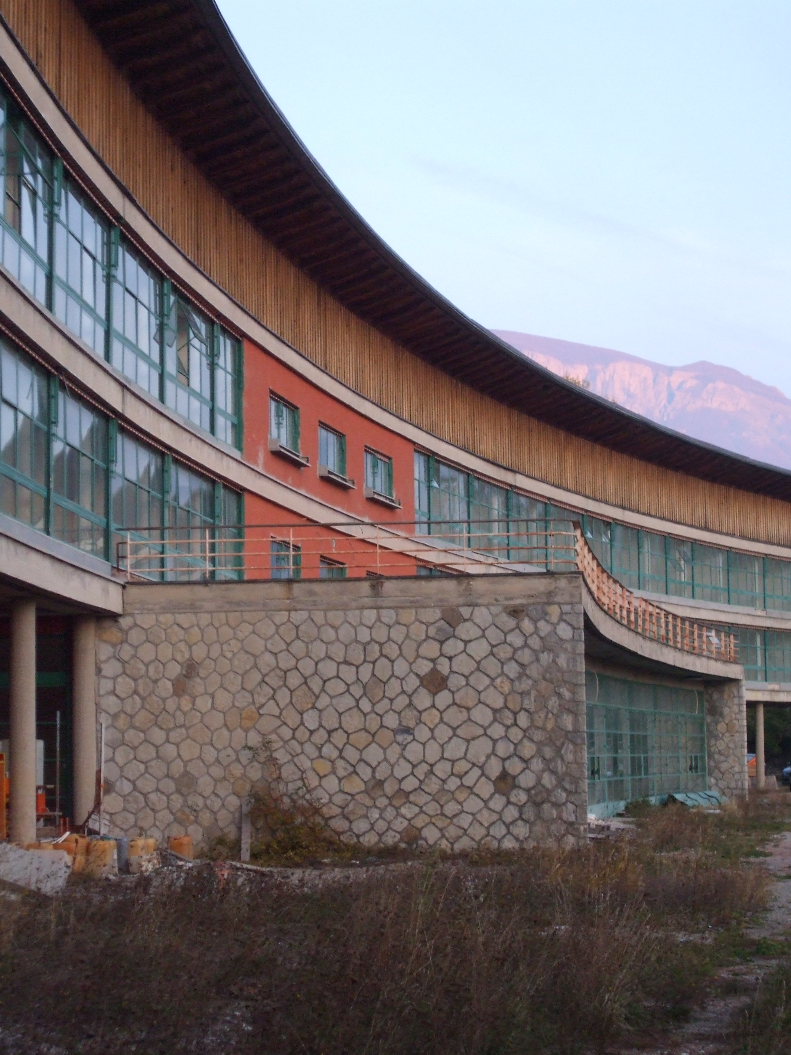 Foto della colonia estiva Piaggio a Santo Stefano d'Aveto